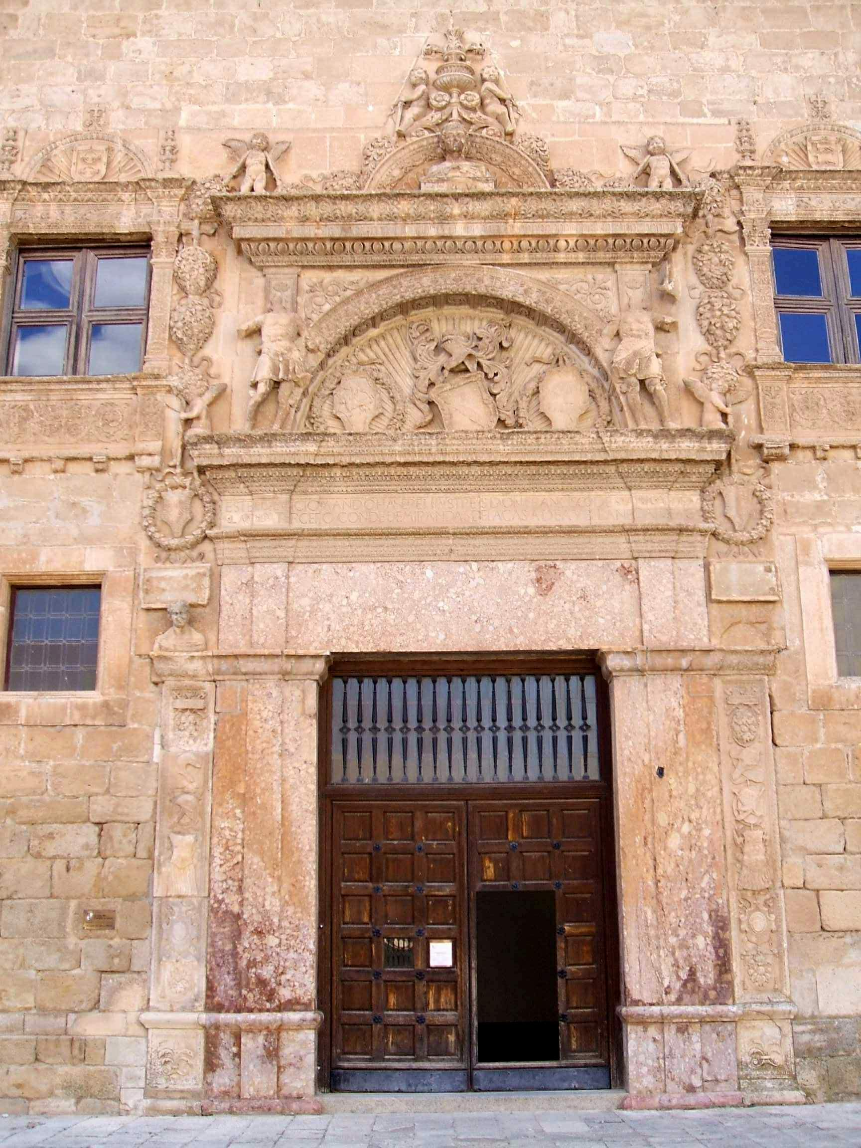 Palacio de los Condes de Miranda, Peñaranda de Duero (Burgos)